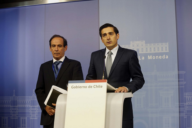 Ministro Rodrigo Peñailillo informando a la ciudadanía que se ha decretado Estado de Excepción Constitucional de Catástrofe para la Región de Atacama, Chile, por el temporal